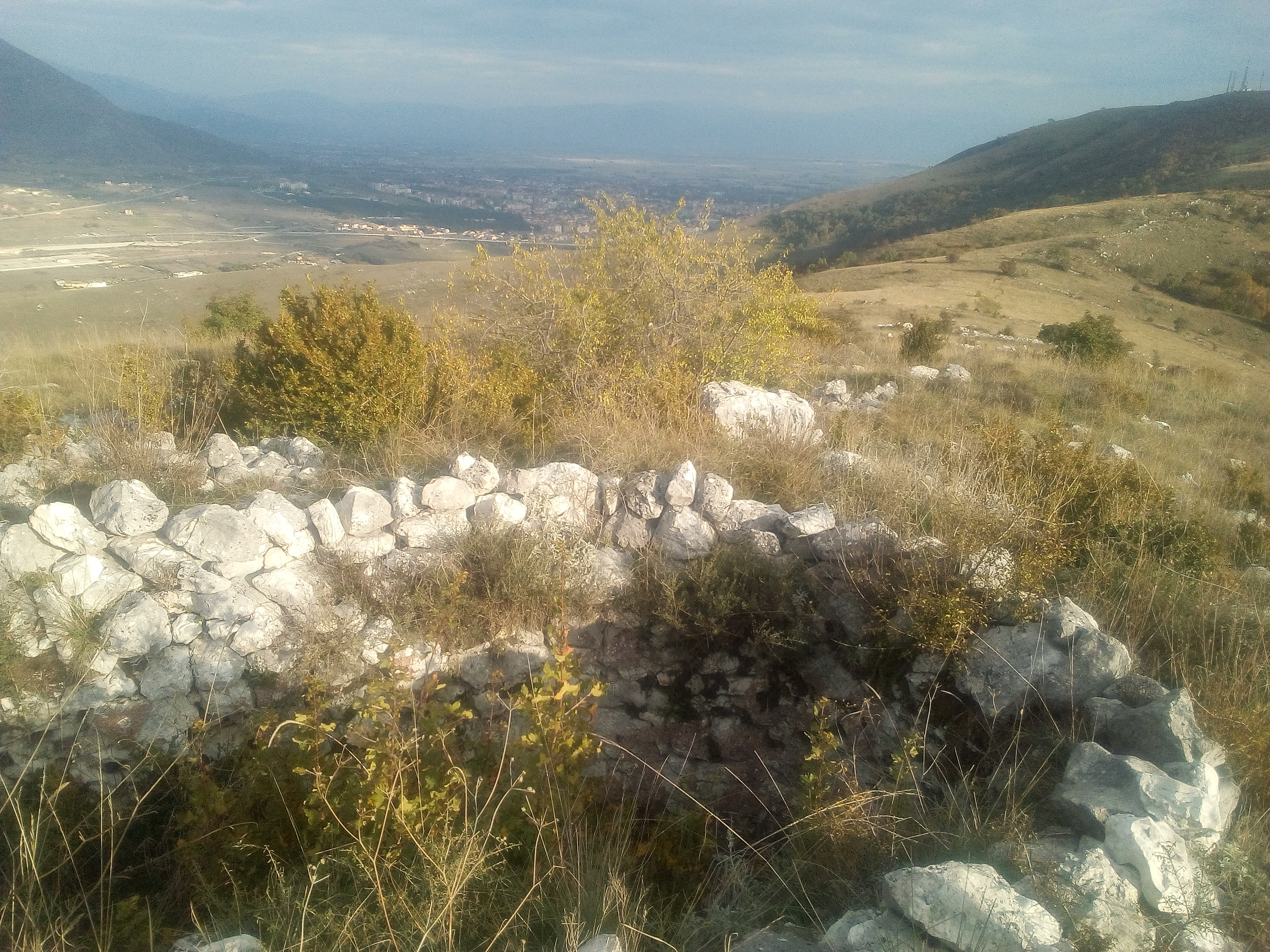 Resti della cisterna di San Giovanni d'Alizio sul monte San Felice (Cappelle dei Marsi)